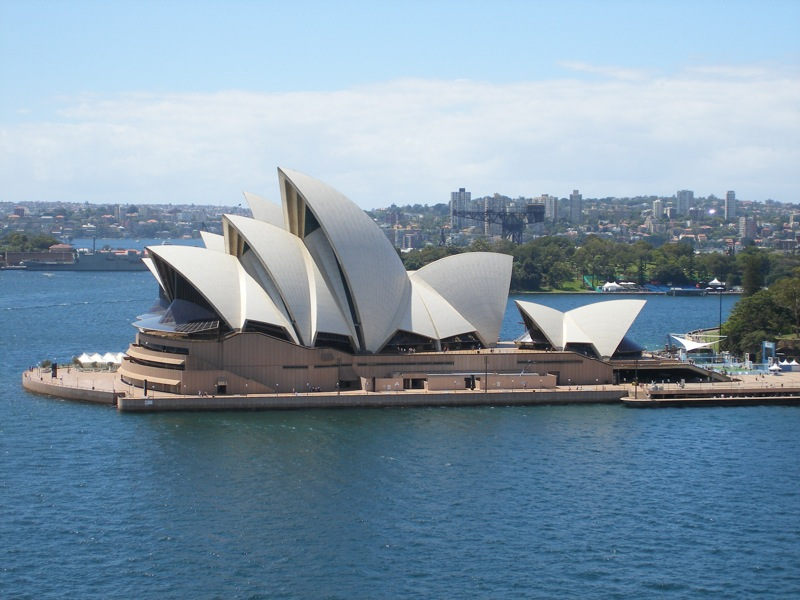 Imagen general de la ópera de Sydney